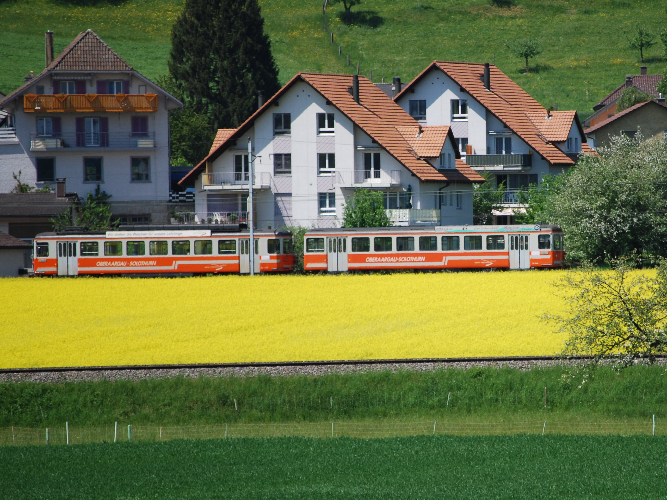 Solthurn-Niederbipp-Bahn